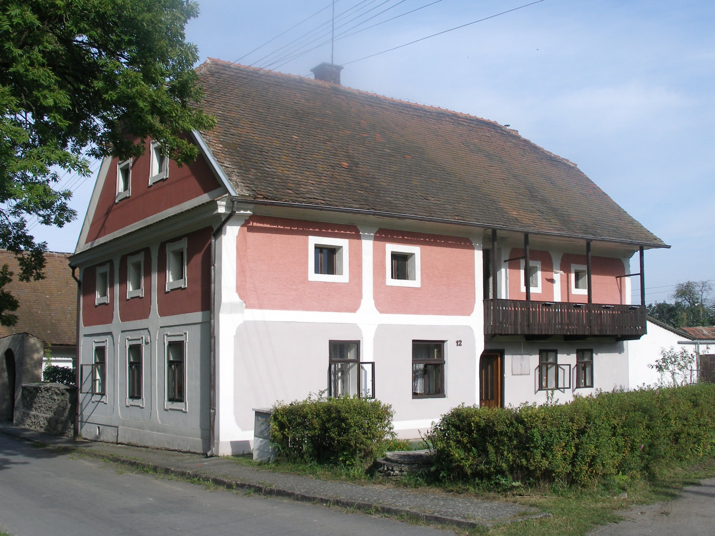 Zemědělska usedlost v Sedlíšťce